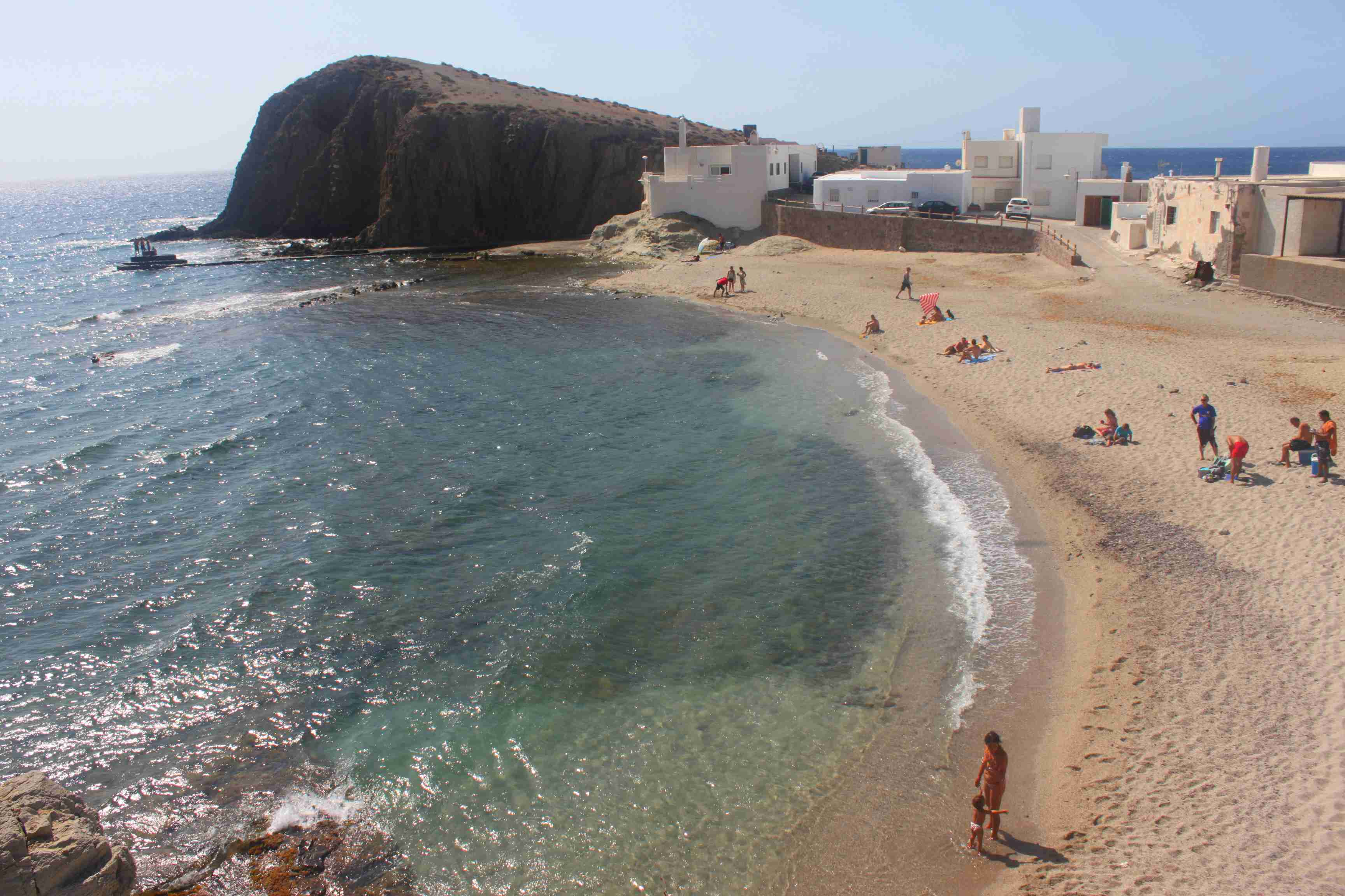 Playa de La Isleta del Moro